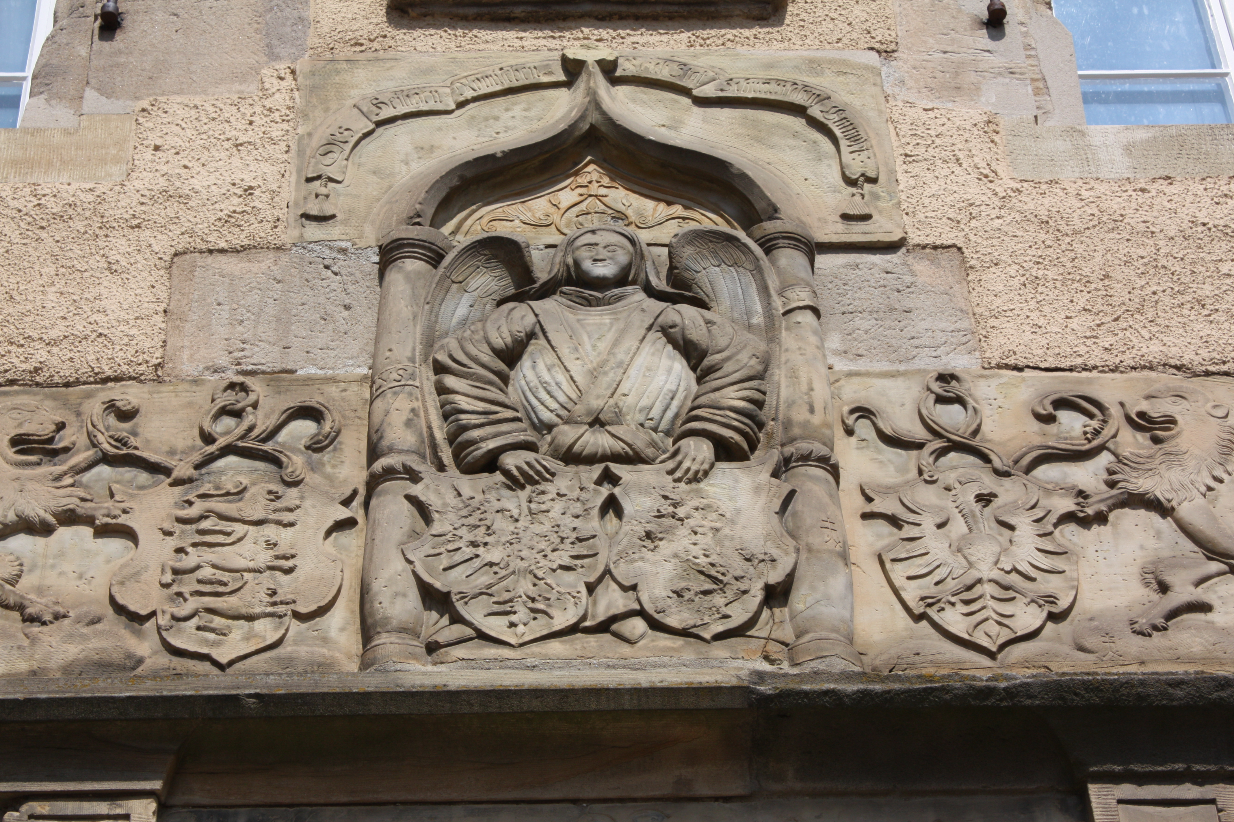 Fassade des Schwörhauses in Schwäbisch Gmünd mit dem Wappen der Reichsstadt